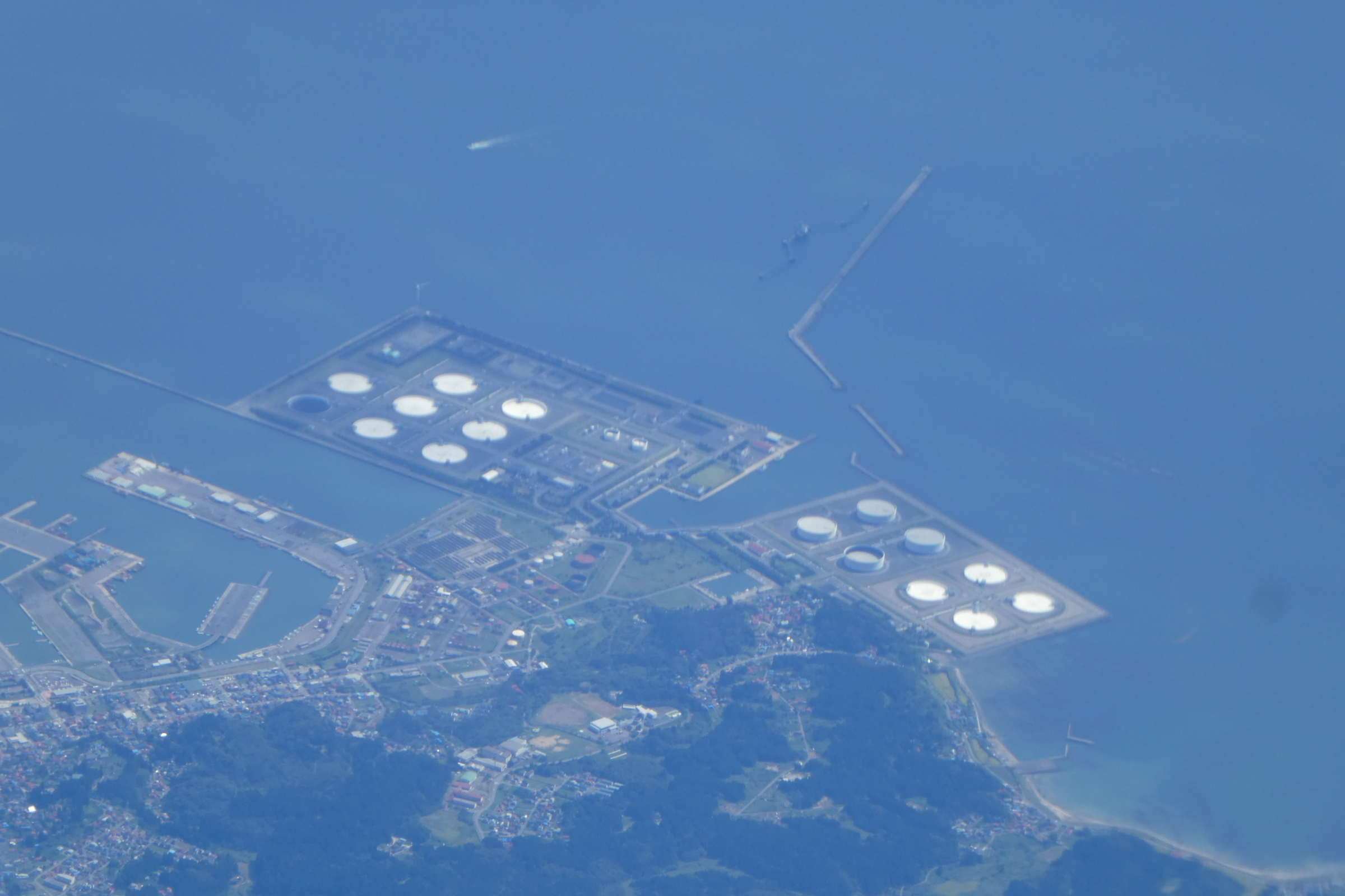 秋田国家石油備蓄基地